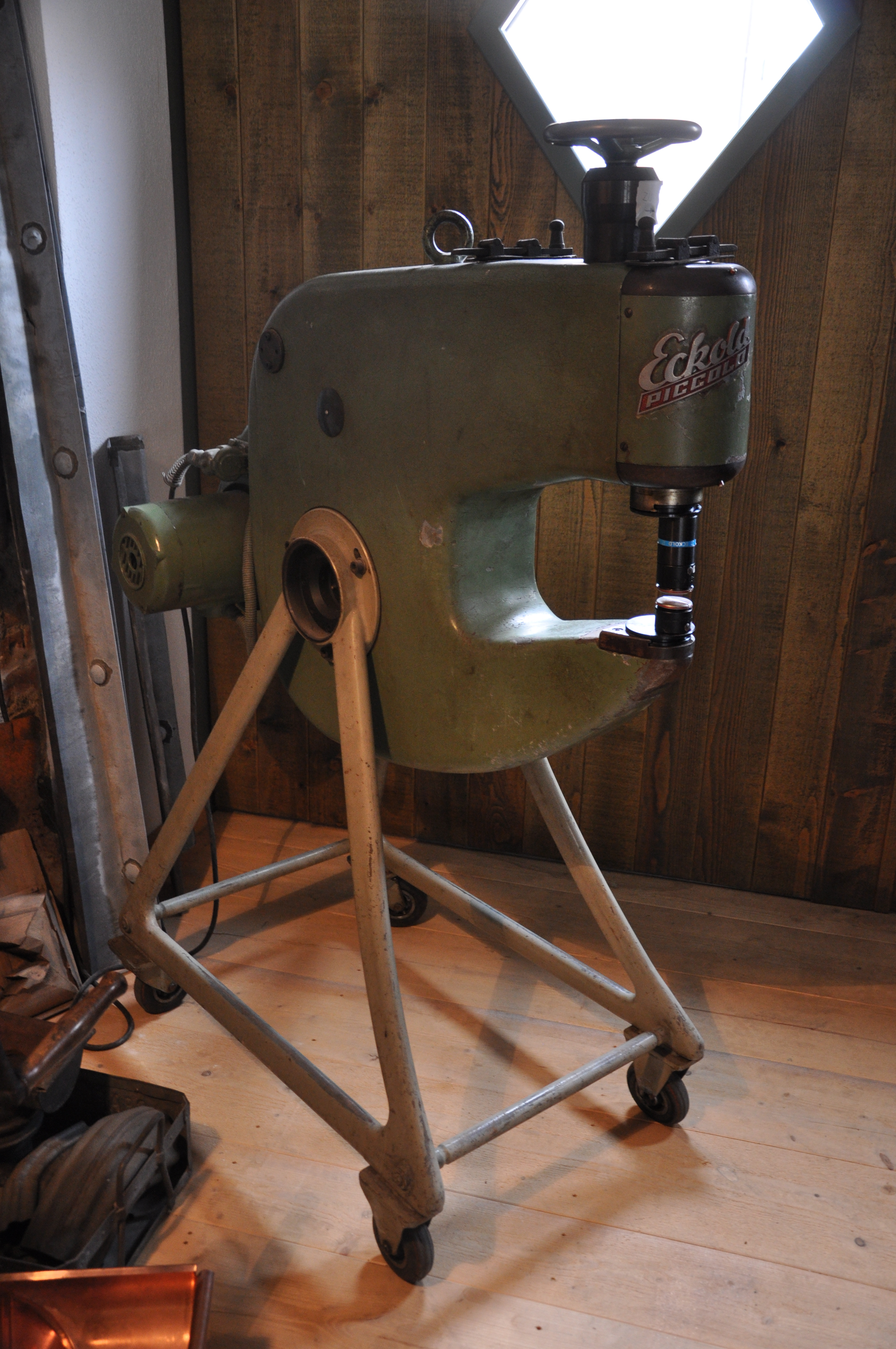 Kißlegg, Flaschnerei Huber, Restaurierungswerkstatt mit historischer Werkstatteinrichtung (siehe flaschnerei-huber.de), Tag der Offenen Tür 2013 Kraftformer Eckold "piccolo" von 1958